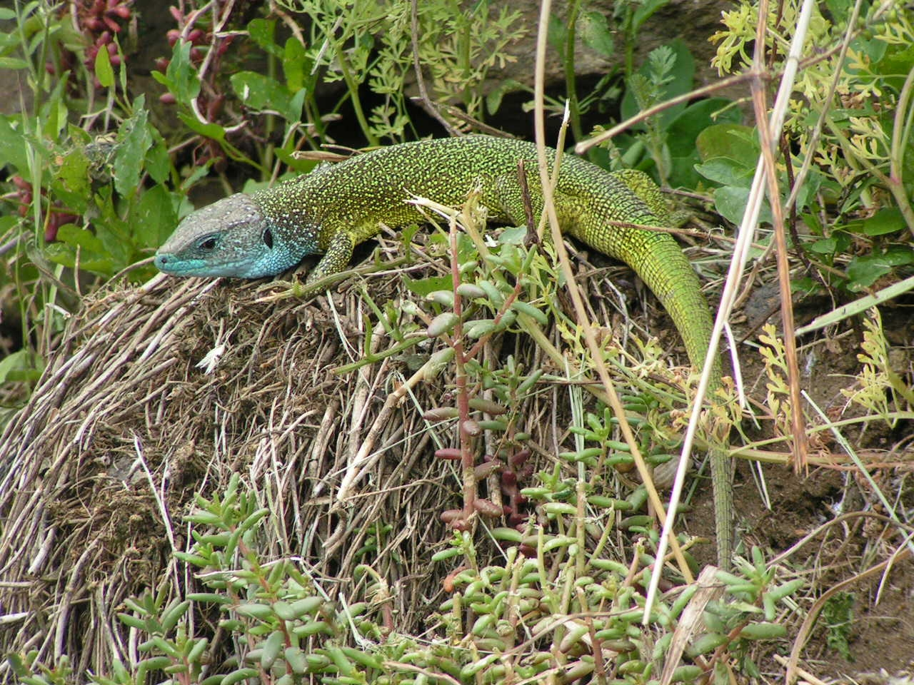 Östliche Smaragdeidechse (Lacerta viridis), aufgenommen im Kamptal (Niederösterreich)